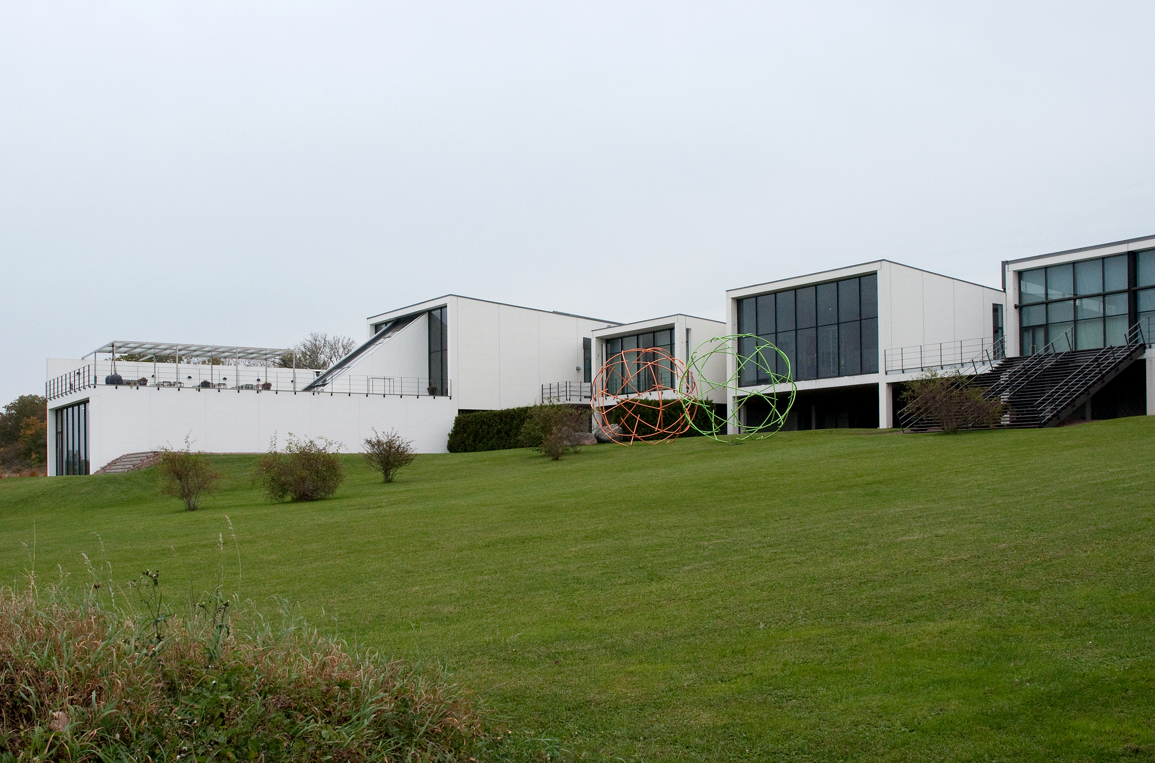 Vida Museum & Konsthall i Halltorp, Öland.